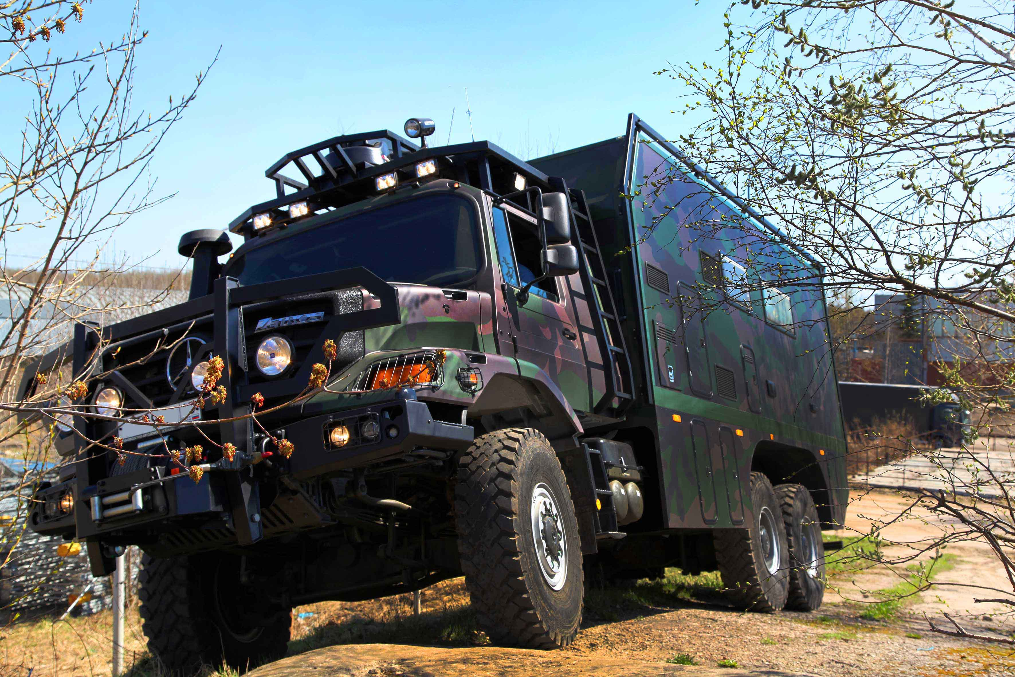 Автодом на базе MB Zetros. Ковчег 010